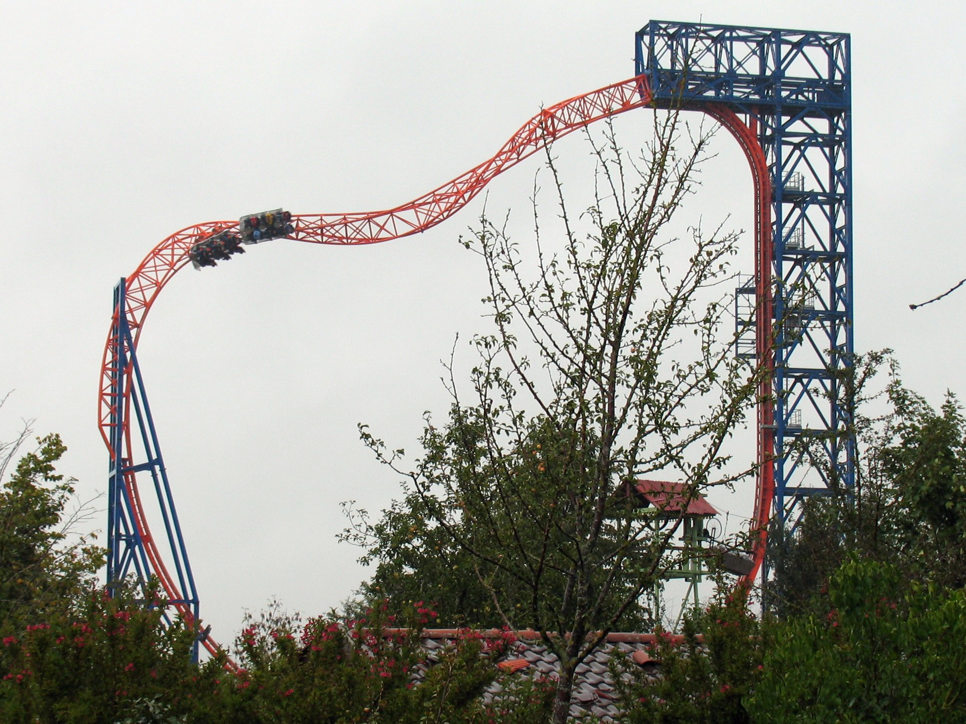 Sky Wheel at Skylinepark